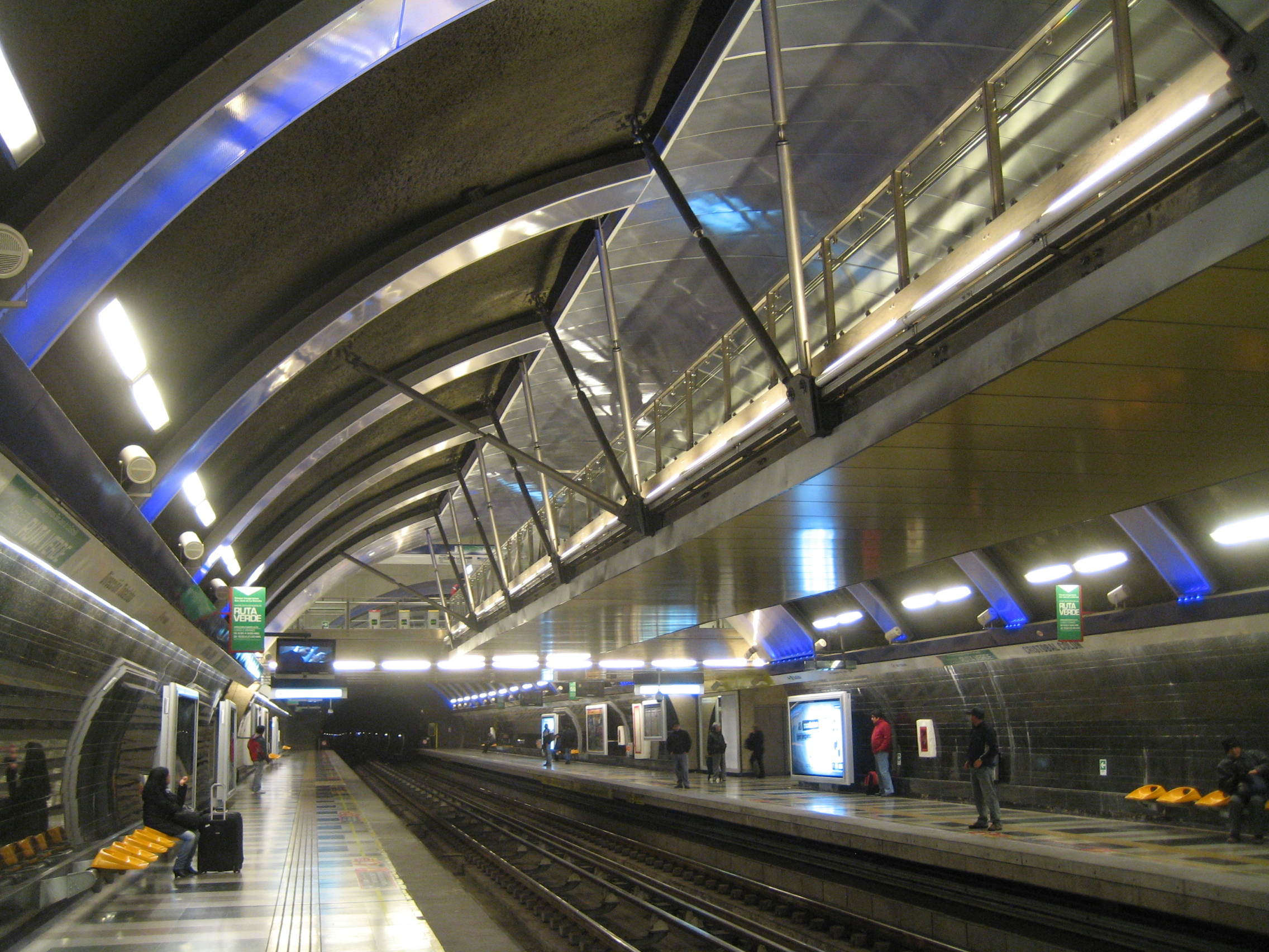 Estación Cristóbal Colón, Metro de Santiago.